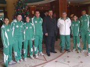 رئيس نادي كهرباء الوسط الرياضي الدكتور أحمد قاسم حسين يتوسط فريق الماراثون المشارك في بيروت